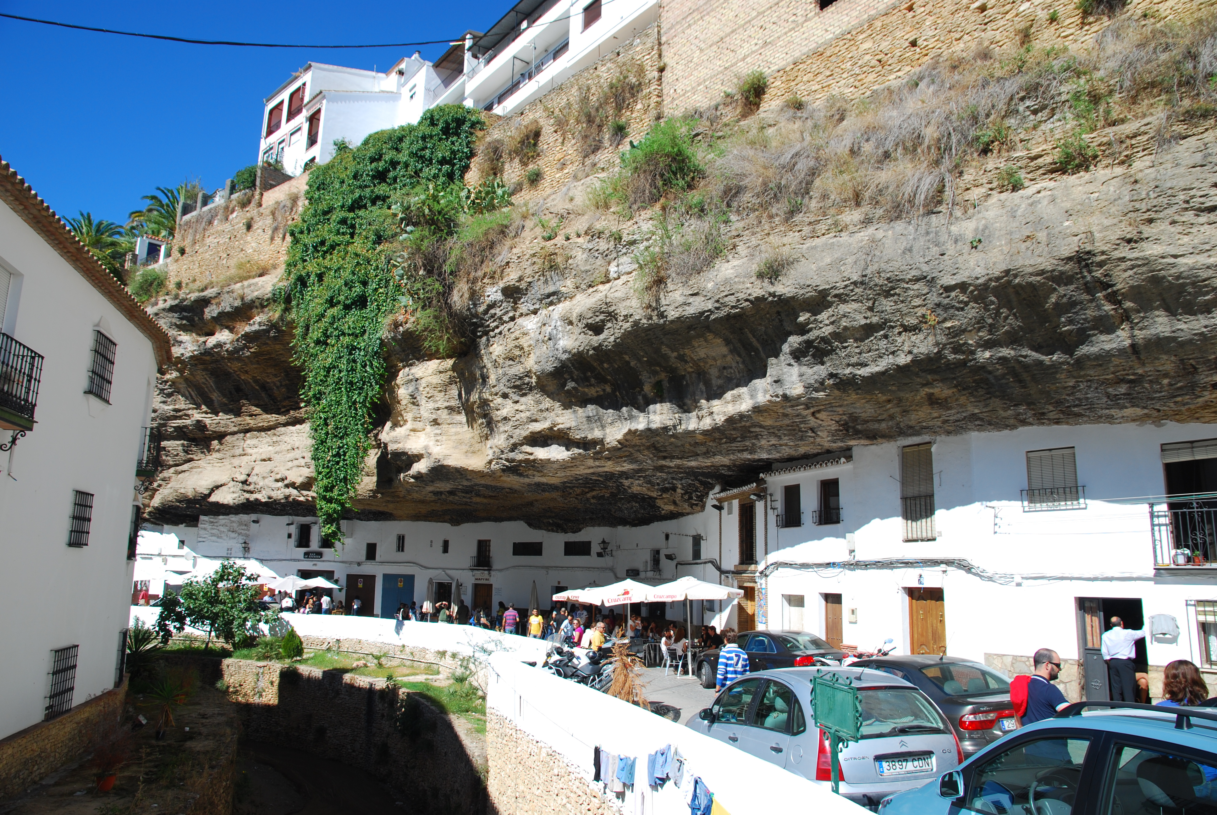 Vista de la localidad de Setenil de las Bodegas, en la provincia de Cádiz (España)